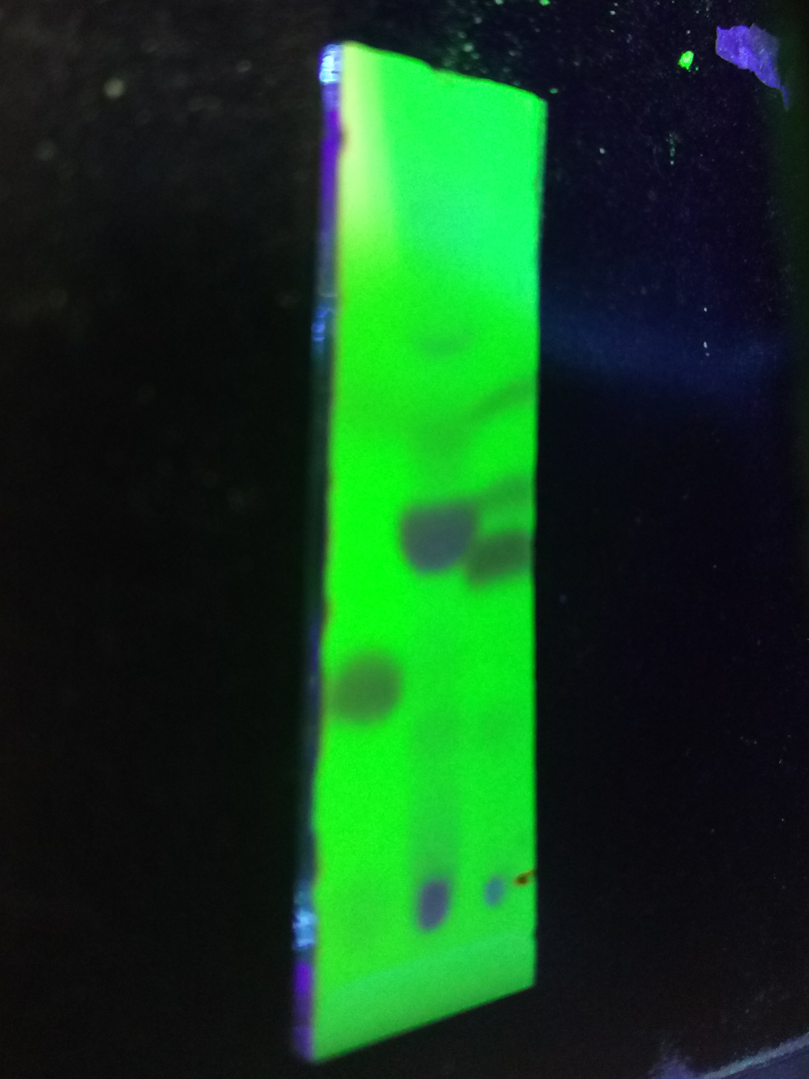 UVランプを用いたTLCのスポット検出